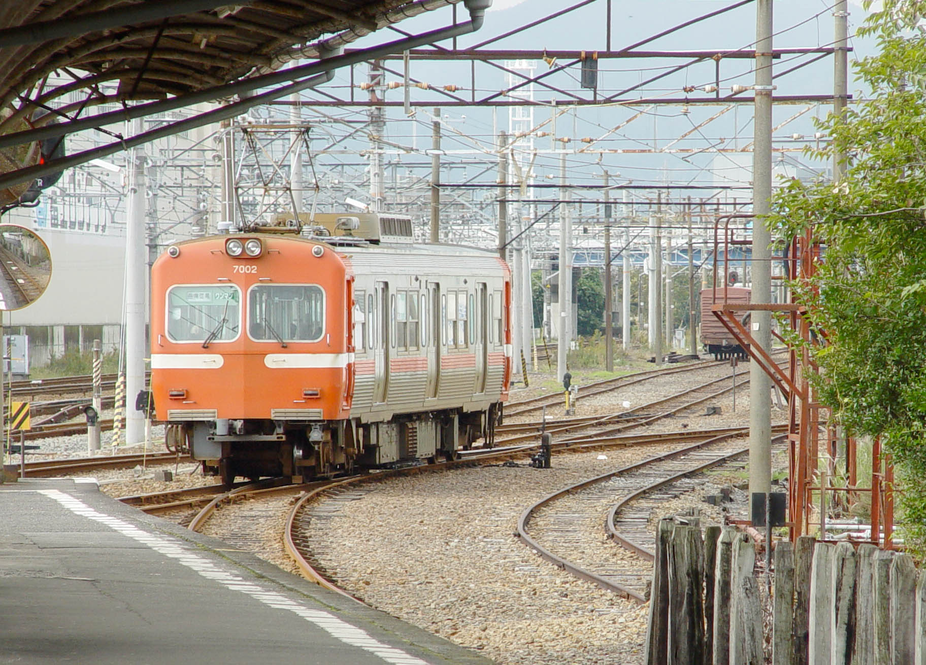 Gakunan train at Yoshihara Station, Gotenba Line, Japan